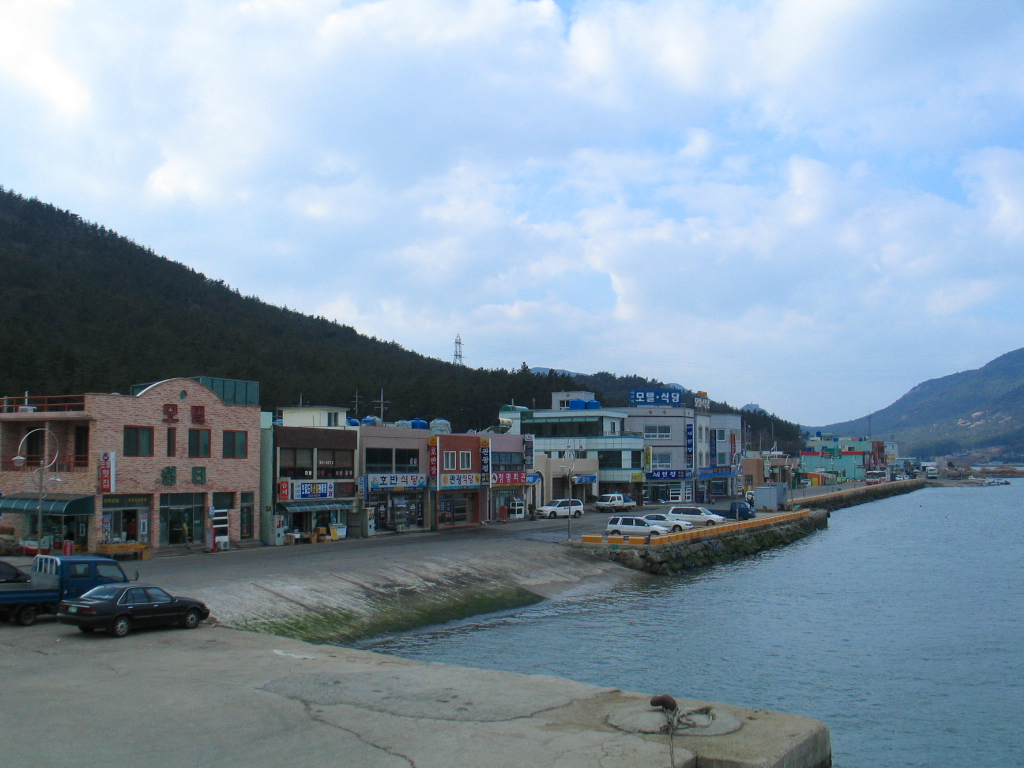 Bogil-do Island